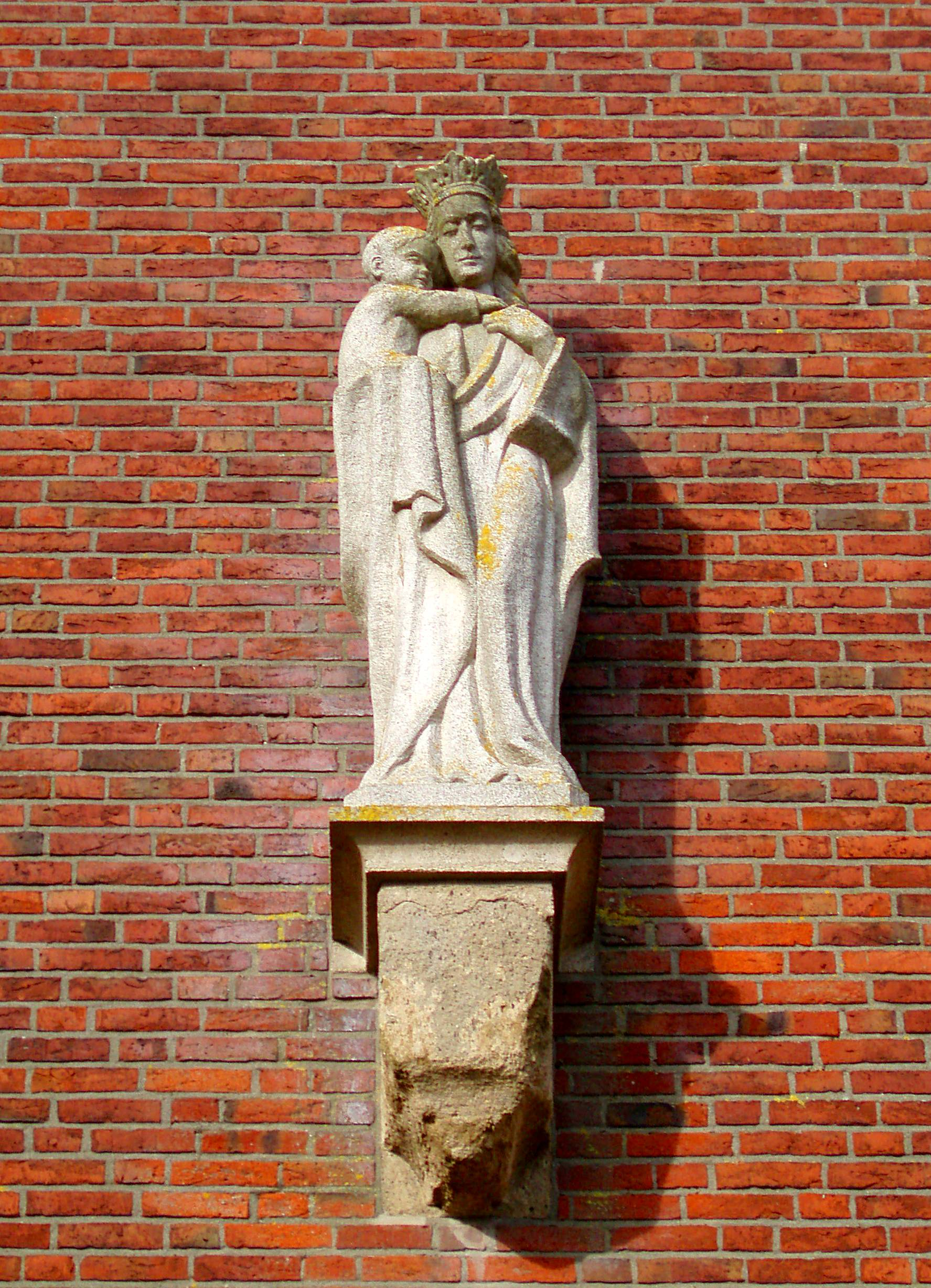 M.Hoffer, 1939